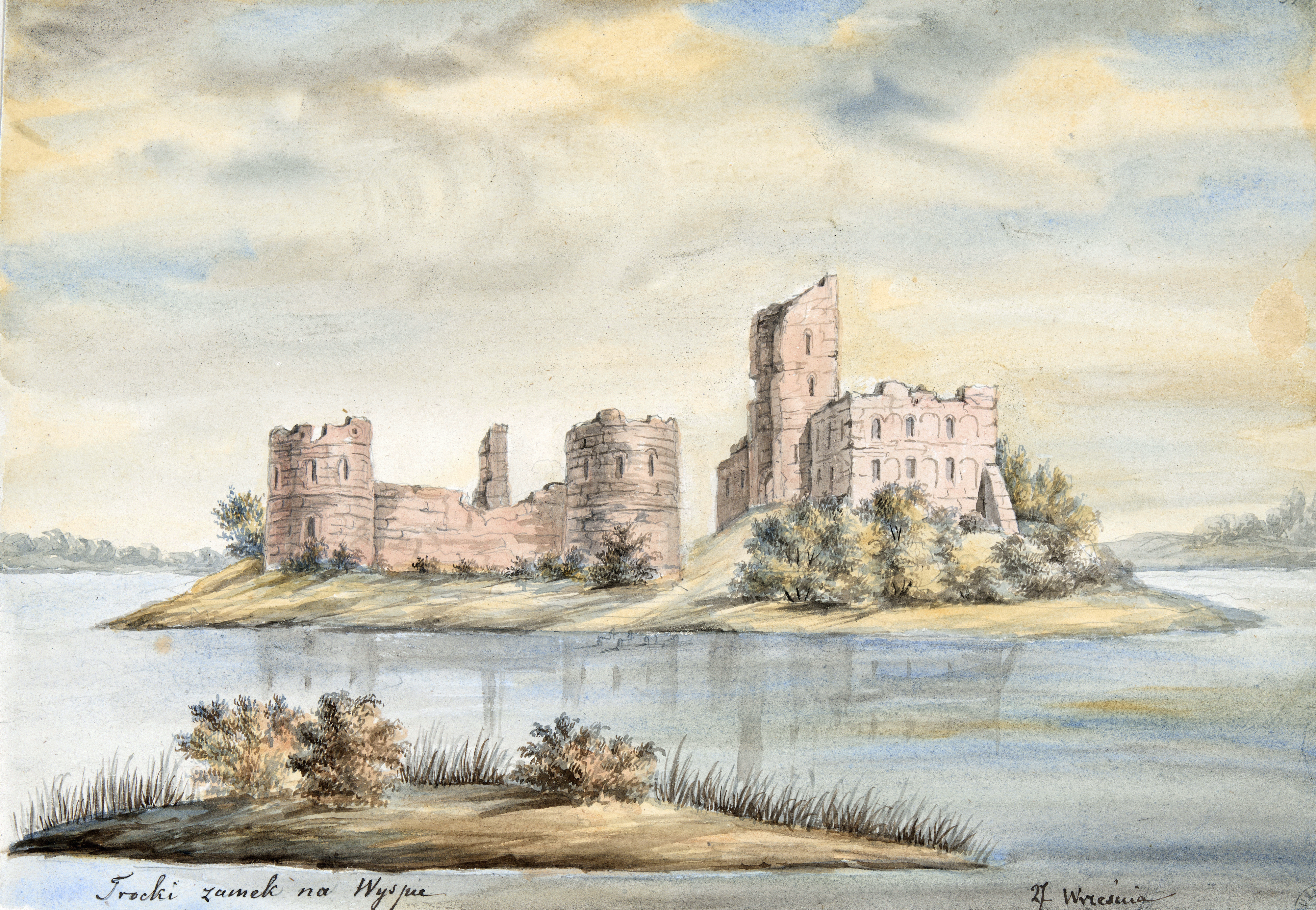 Беларуская (тарашкевіца): Трокі (Troki ). Замак